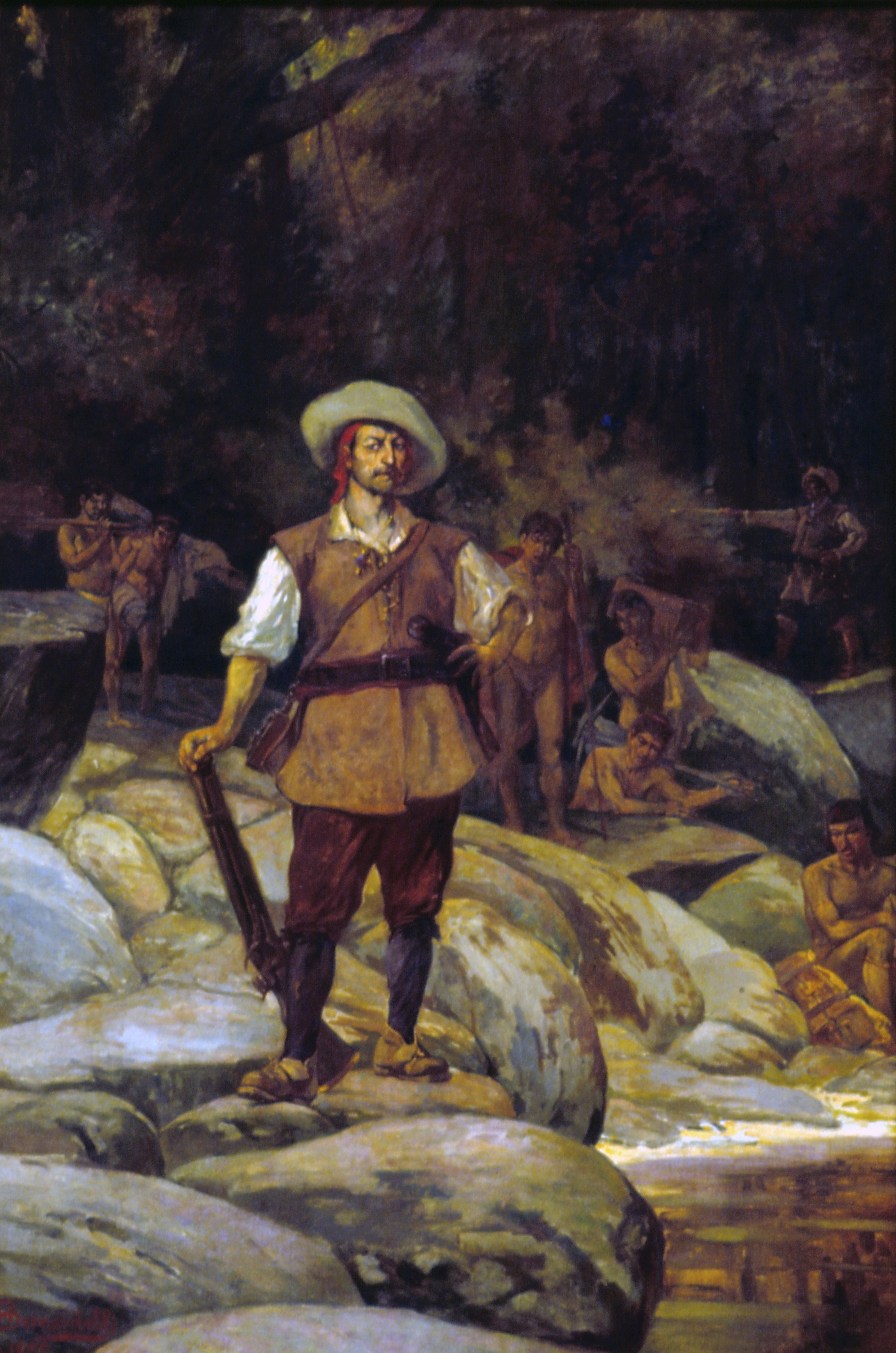 Obra que integra o acervo do Museu Paulista da USP. Coleção Henrique Bernadelli - CHB